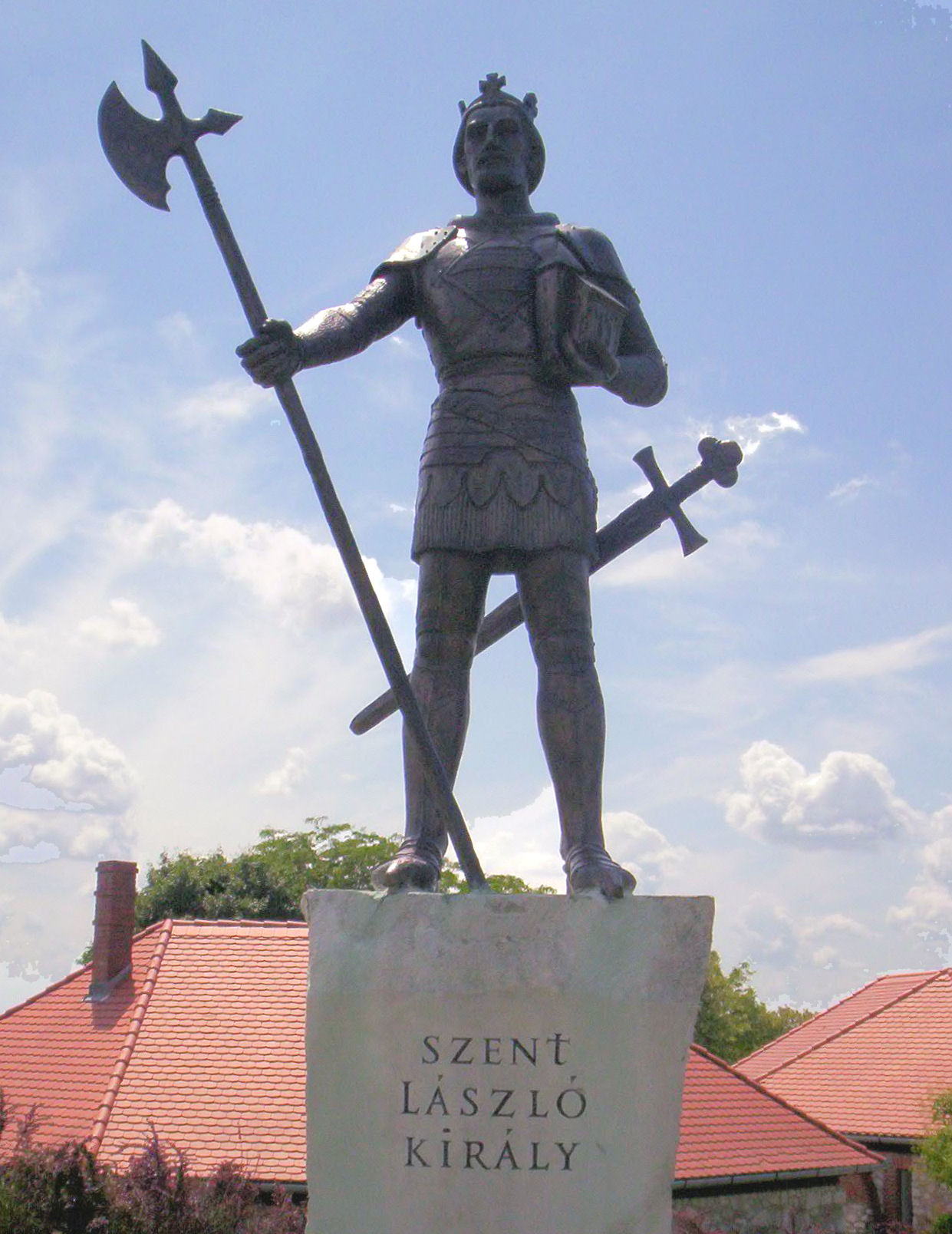 Szent László szobra Somogyváron – photo taken by uploader User:Csanády